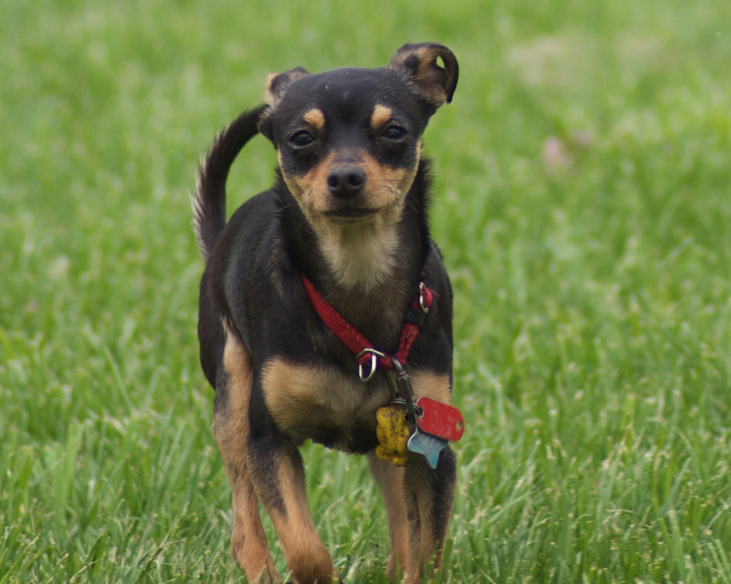 Lennie (our toy Manchester terrier)